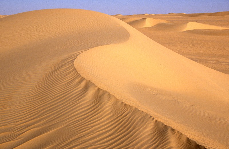 Dünenzüge im abendlichen Licht zwischen Fachi und Bilma in Niger - Sahara, Ténéré.